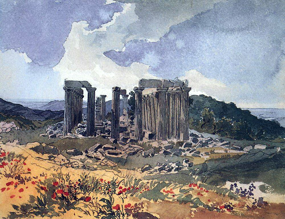 Храм Аполлона Эпикурейского в Фигалии